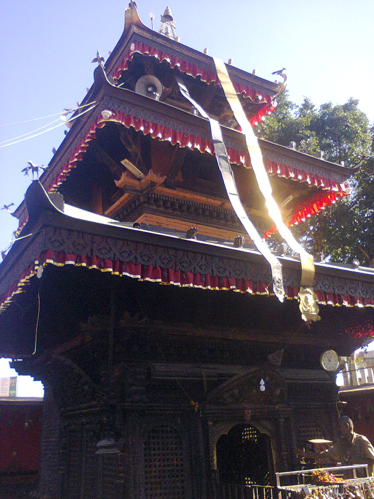 नेपाली: पलाञ्चोक भगवती मन्दिर